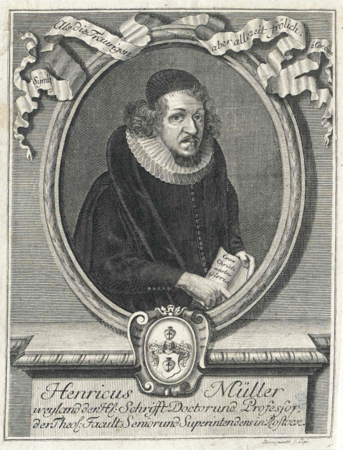 Heinrich Müller (1631–1675)